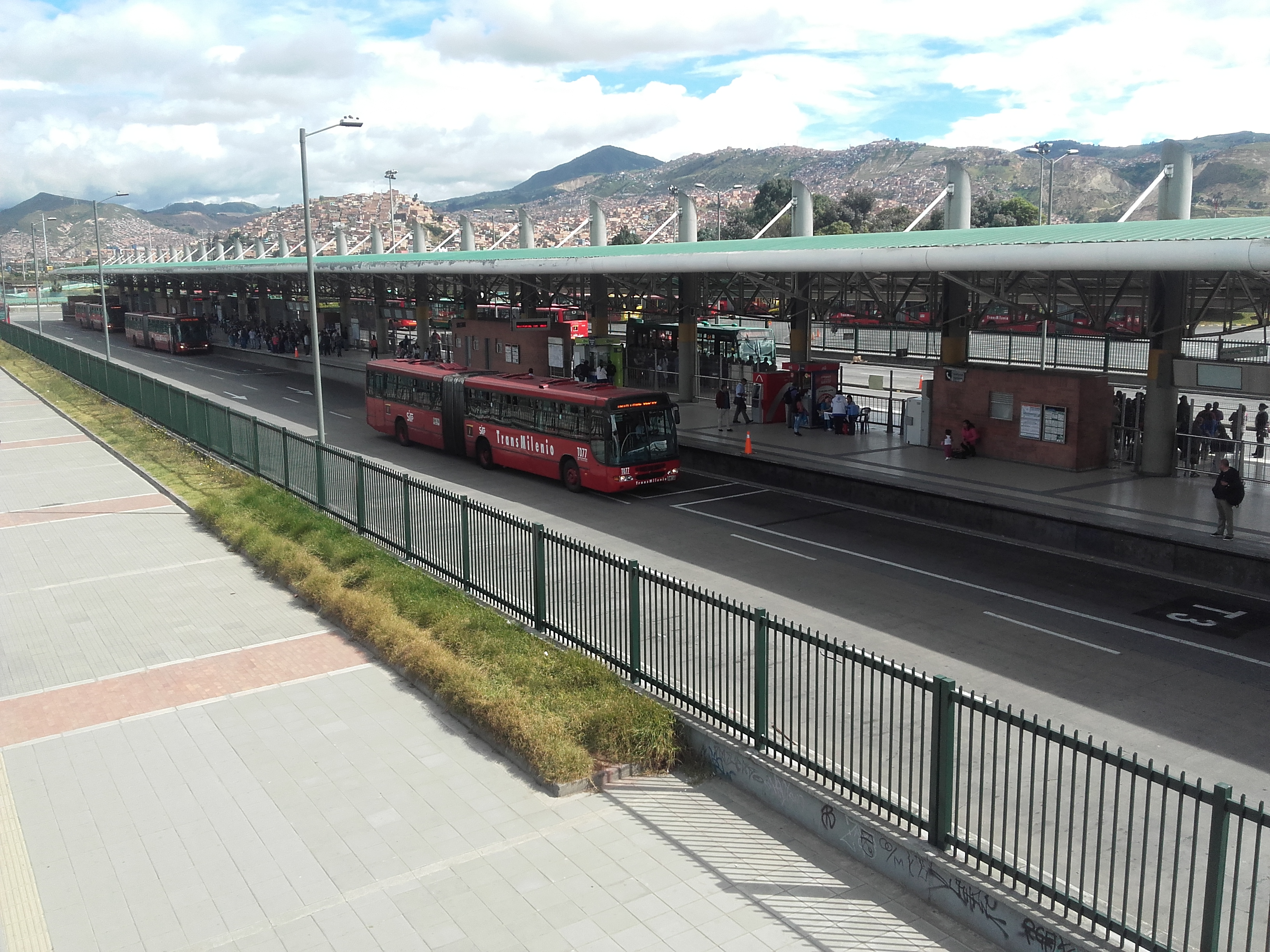 portales